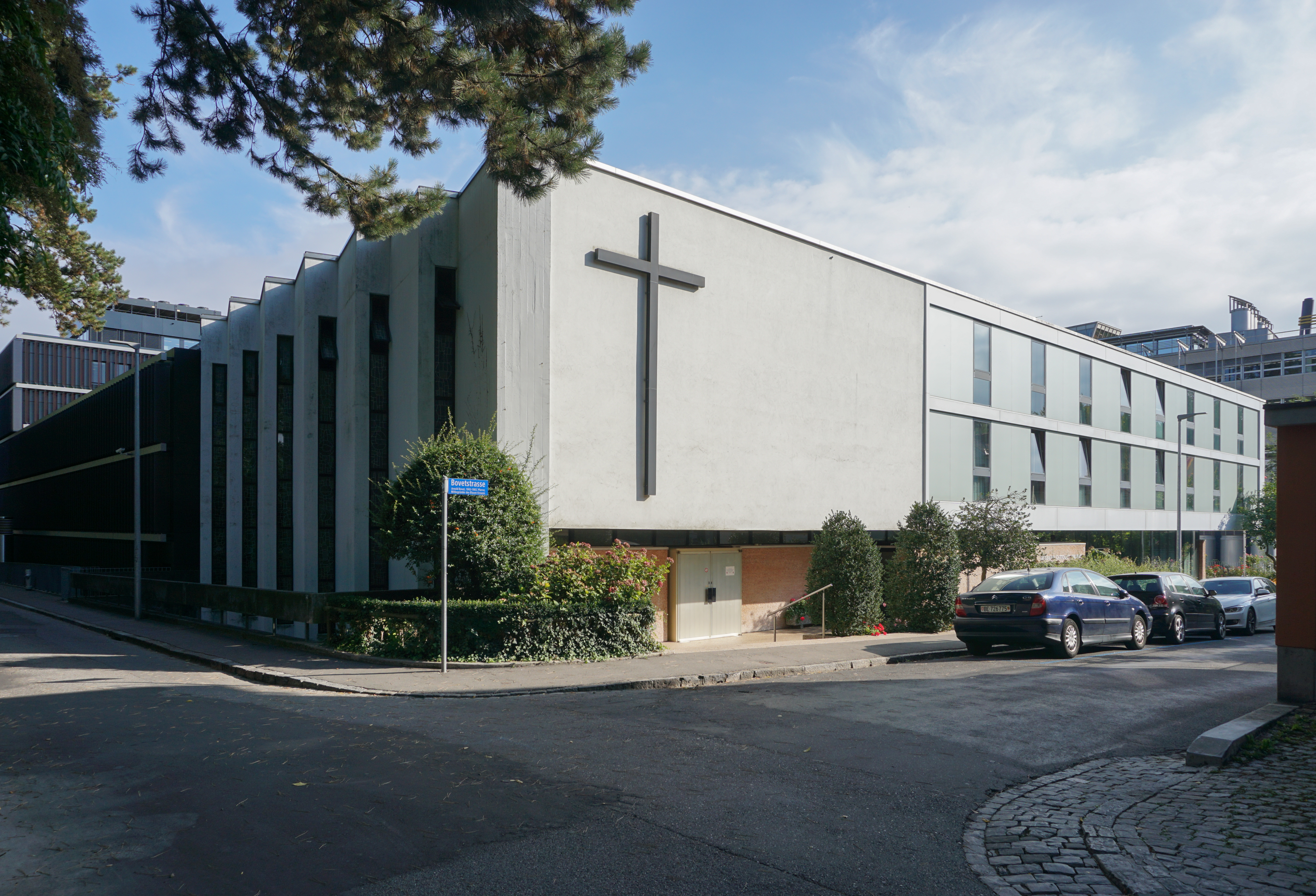 Die Kirche Madonna der italienischen Emigranten in Bern. Erbaut 1963